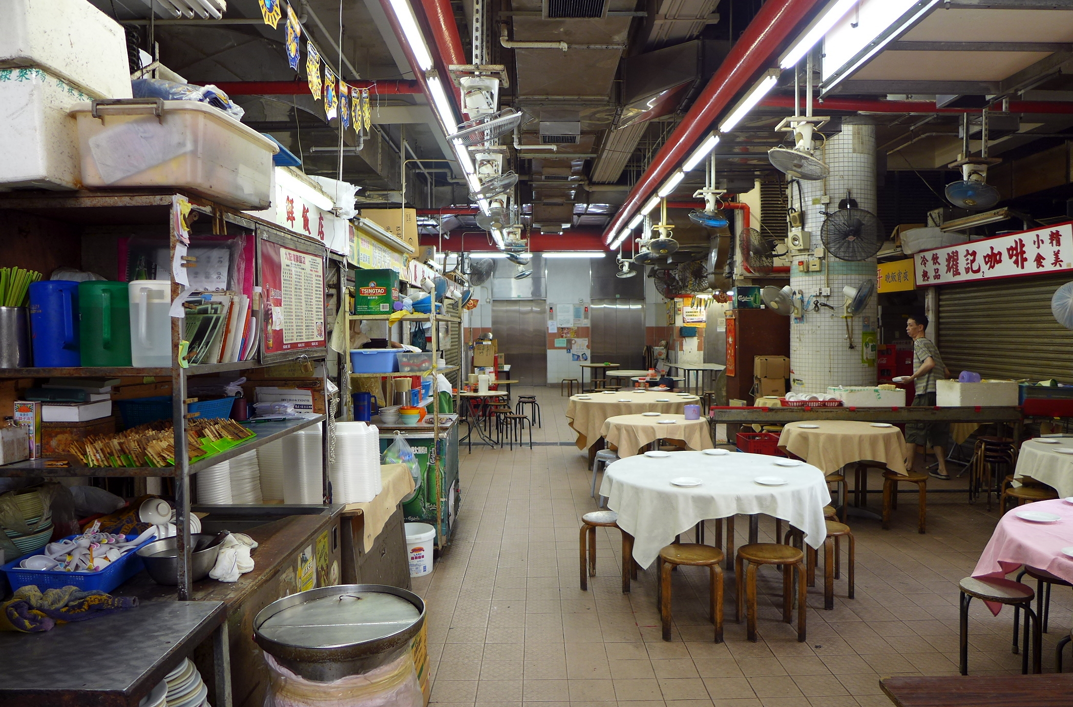 Aberdeen Sports Centre Level 2 Food Centre